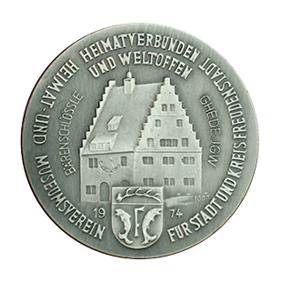 Medaille „Heimatverbunden und weltoffen“ des Heimat- und Museumsvereins für Stadt und Kreis Freudenstadt 1974 mit dem Bärenschlössle in Freundenstadt.